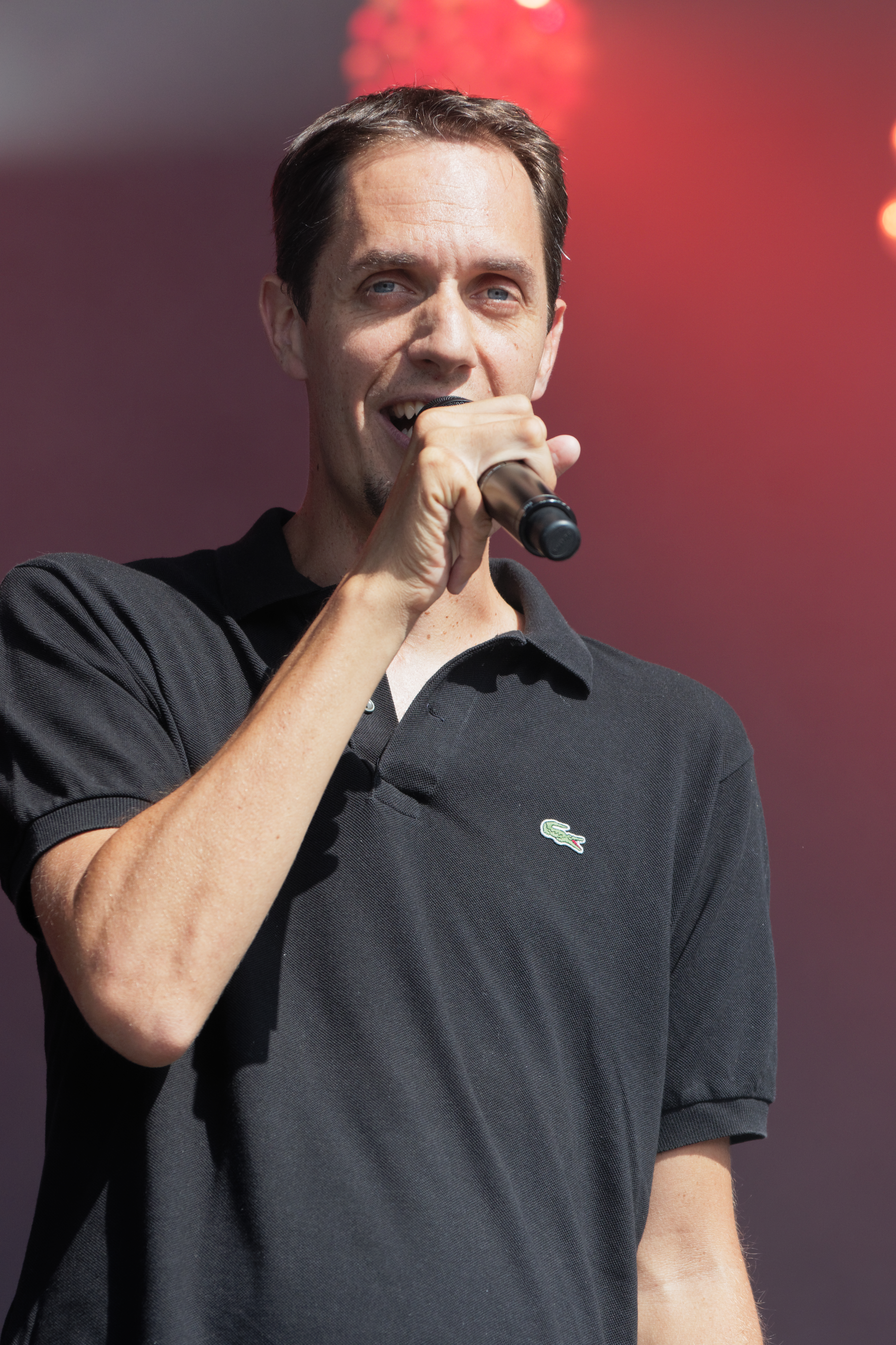 Grand Corps Malade en concert sur la scène Landaoudec lors du festival du Bout du Monde 2018 à Crozon dans le Finistère (France).